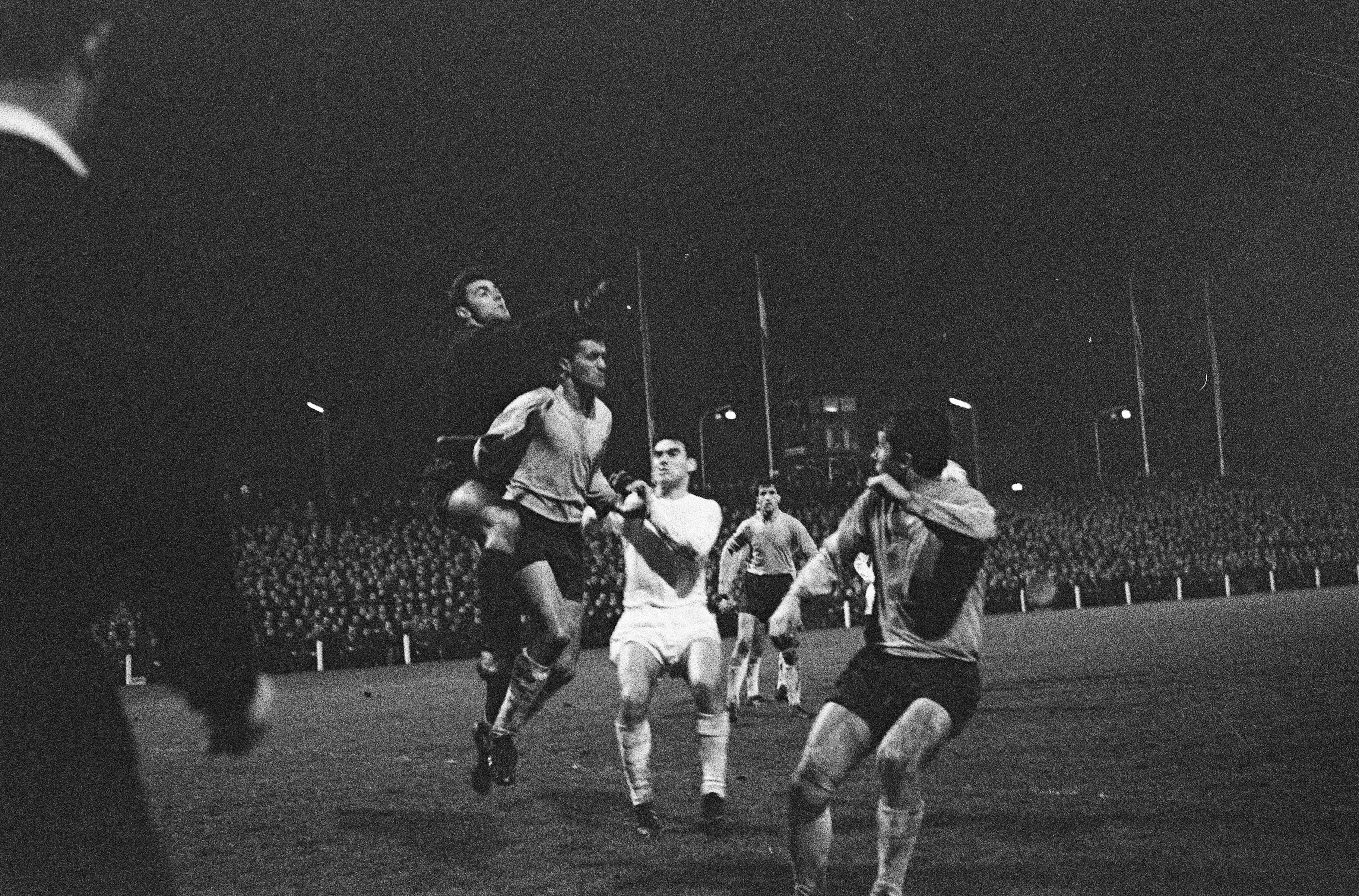 Collectie / Archief : Fotocollectie Anefo Reportage / Serie : [ onbekend ] Beschrijving : PSV tegen Spartak Plovdiv 0-0 voor Europa Cup . Spelmomenten Datum : 27 november 1963 Locatie : Eindhoven Trefwoorden : sport, voetbal Instellingsnaam : Europa Cup Fotograaf : Pot, Harry / Anefo Auteursrechthebbende : Nationaal Archief Materiaalsoort : Negatief (zwart/wit) Nummer archiefinventaris : bekijk toegang 2.24.01.05 Bestanddeelnummer : 915-7863